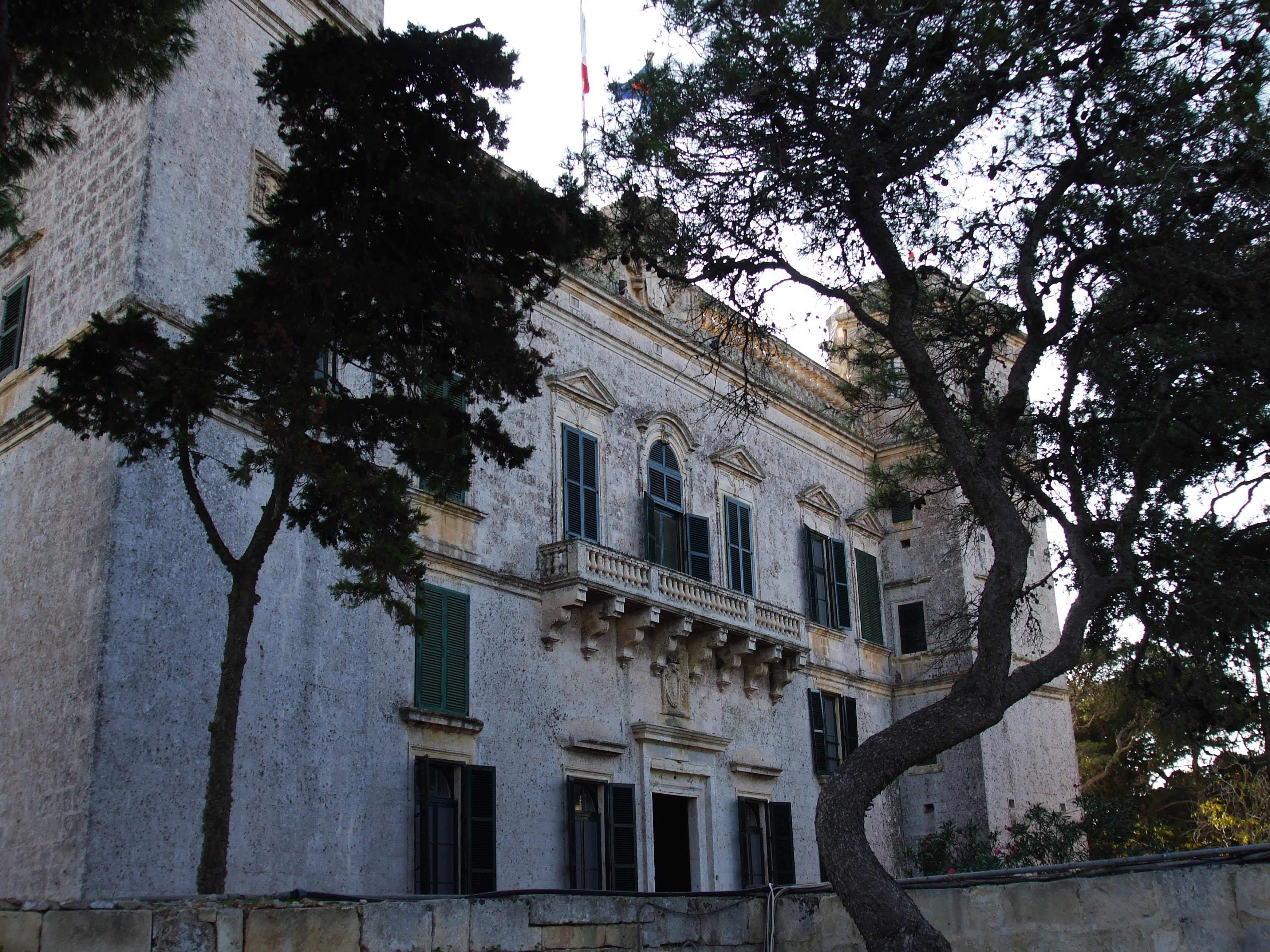 Palazz Verdala